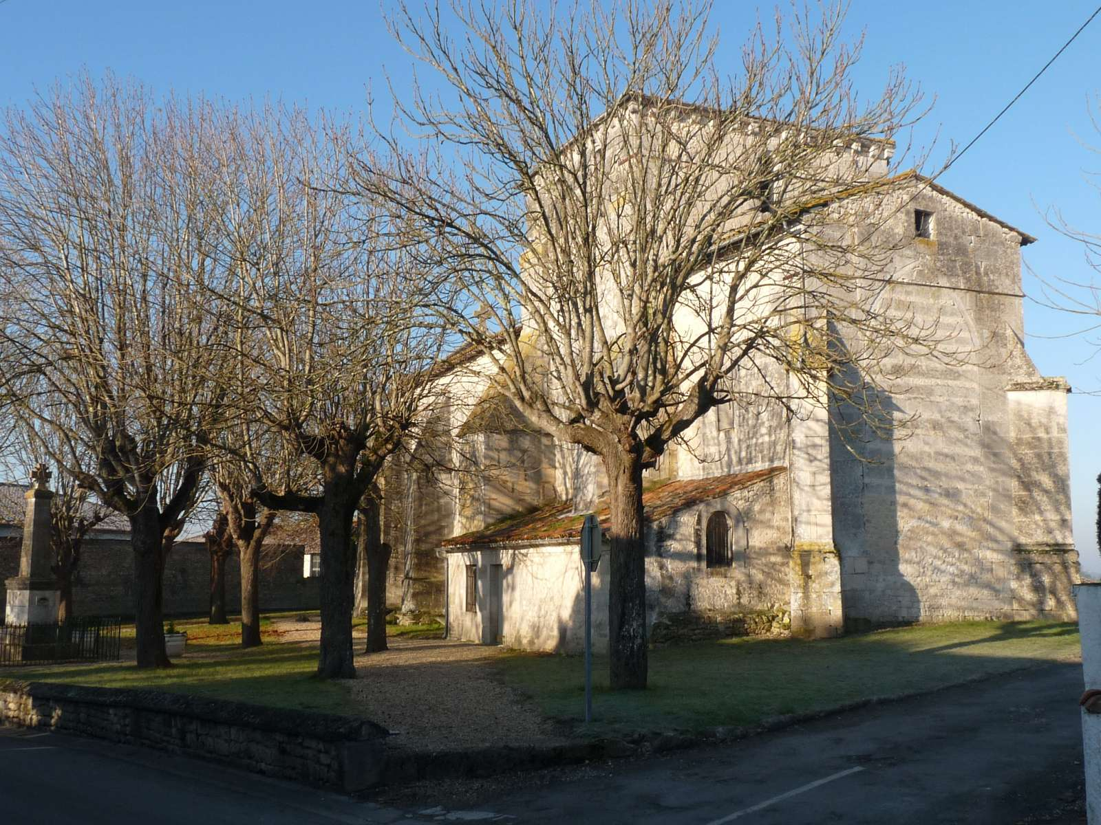 église de St-Fort-sur-le-Né, Charente, France